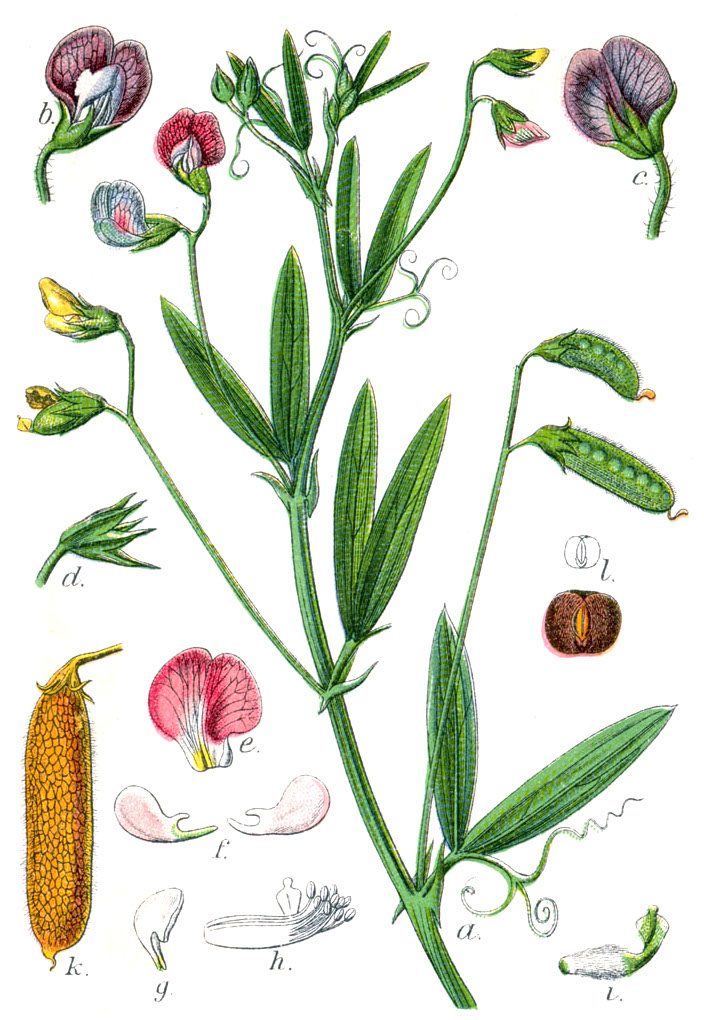 Lathyrus hirsutus L, syn. Pisum hirsutum (L.) E.H.L.Krause Original Caption Behaarte Kichererbse, Pisum hirsutum